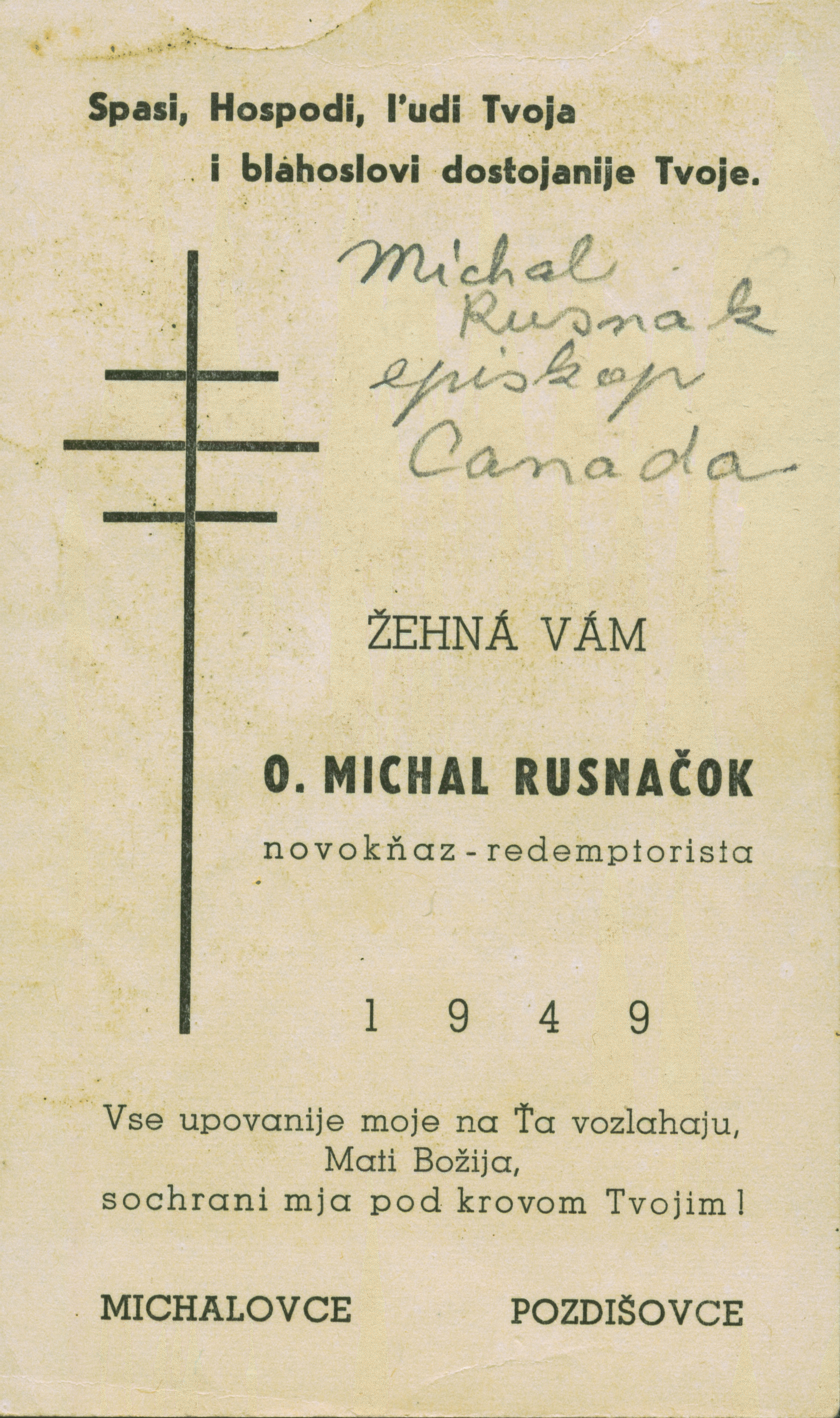 Biskup Michael Rusnak mal v r. 1949 na Slovensku vytlačené takého primičné obrázky. Document scanned by Jozafát Vladimír Timkovič, OSBM